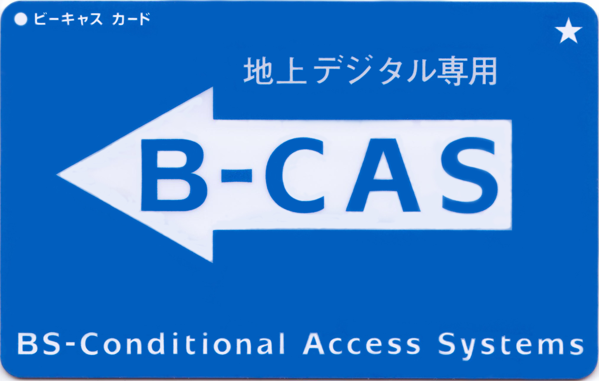 自宅にてキャナーで取り込み